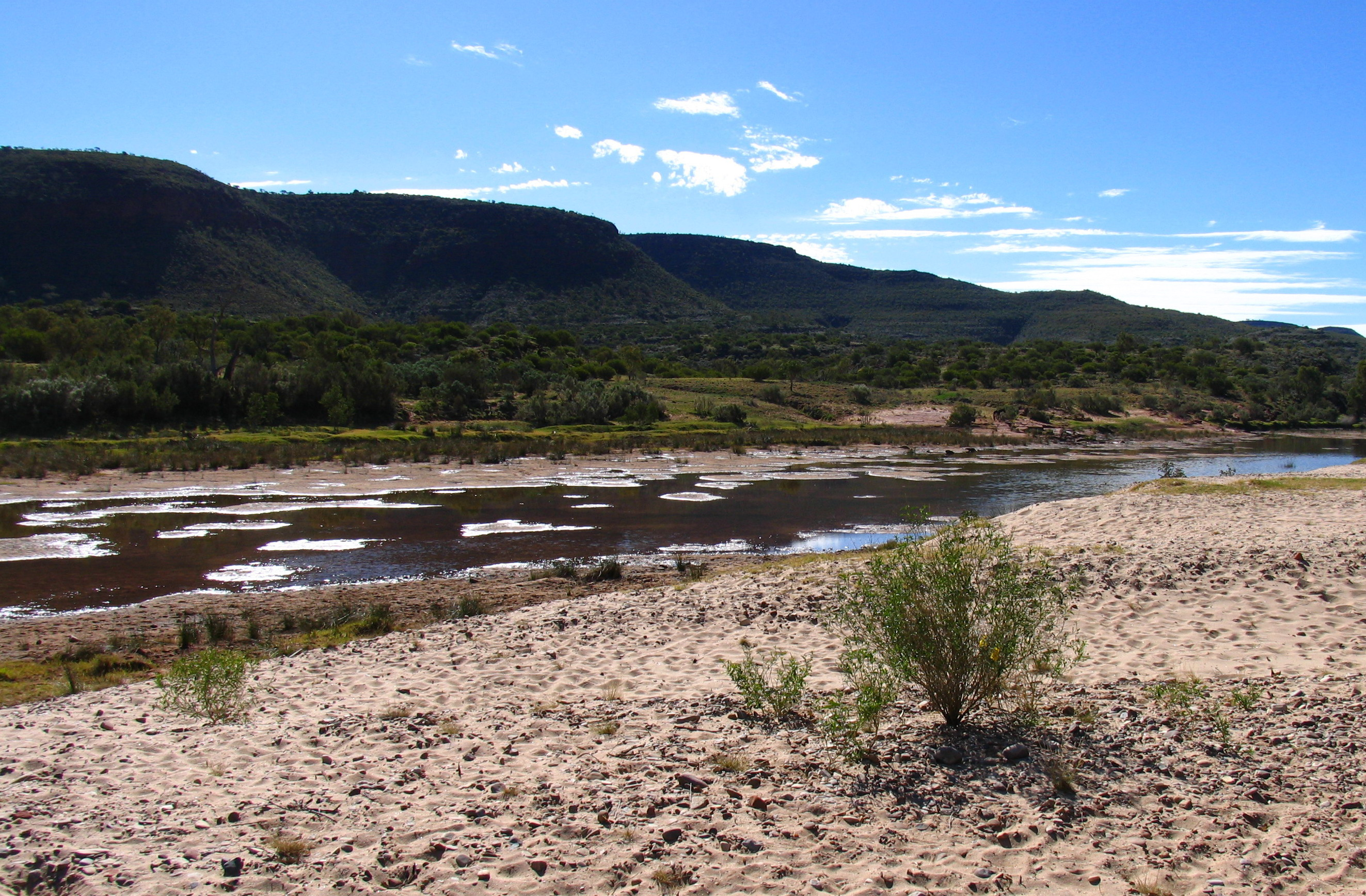 La Finke River en Australie